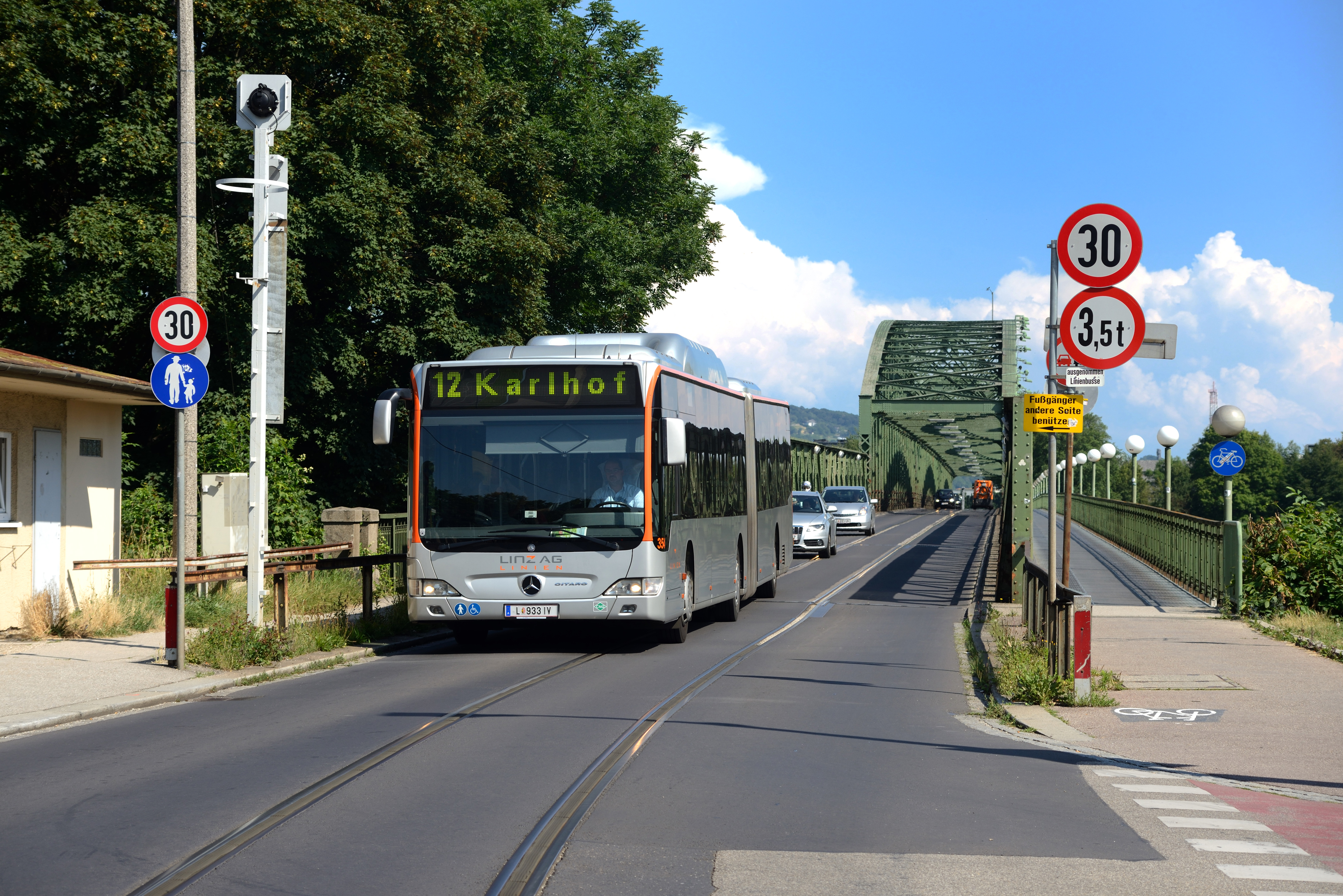 Mercedes Citaro G CNG Nr. 354 als Linie 12 nahe der Haltestelle Heilhamer Weg.